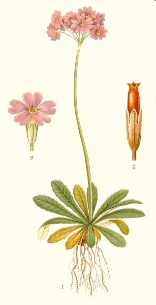 Original Description Majviva, Primula farinosa L.